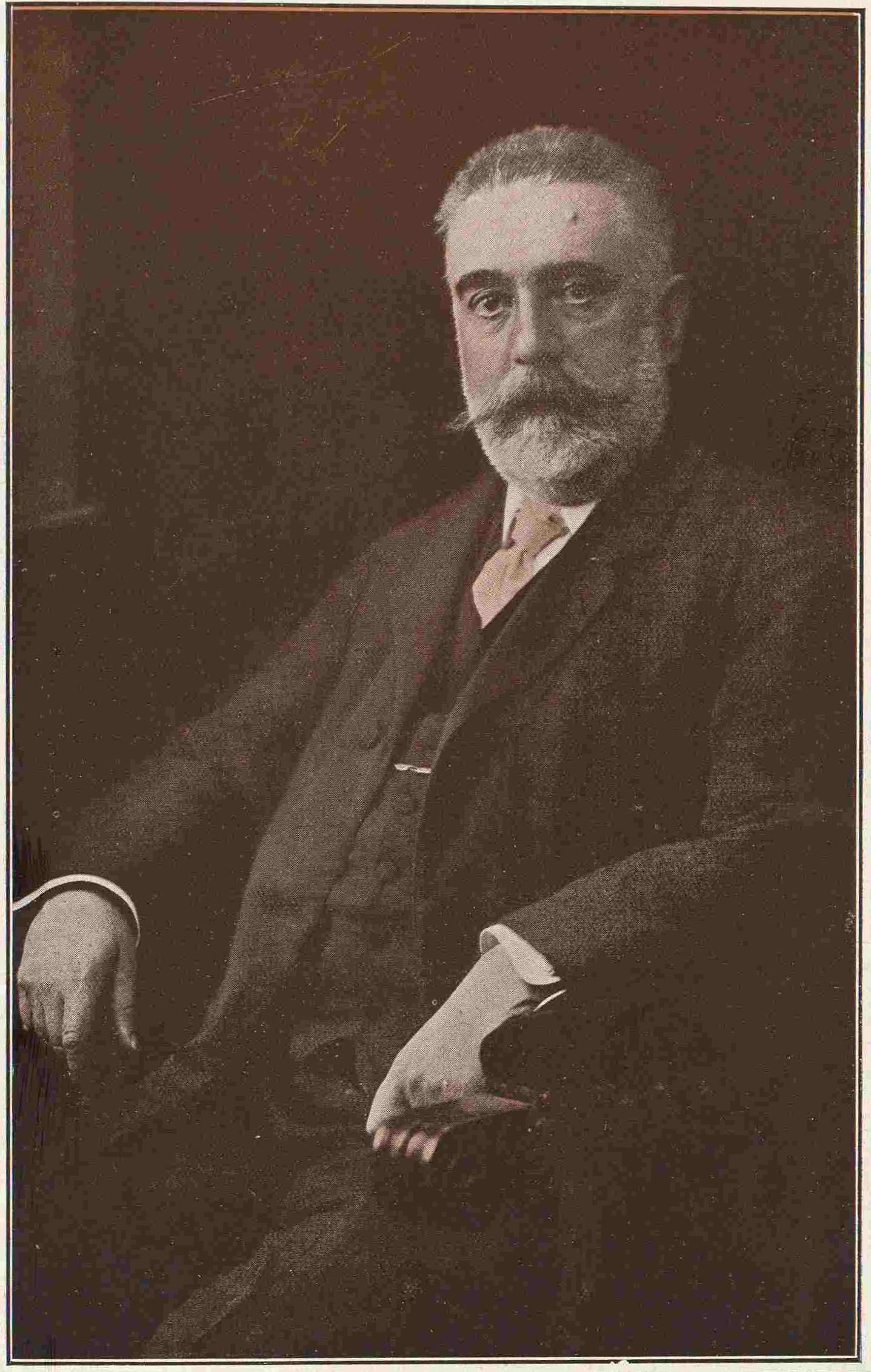 Miguel Ramos Carrión. fotografía de Franzen.